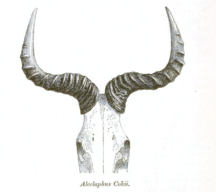 Alcelaphus cokii, skull drawing